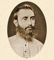 Aaron Zundelevich